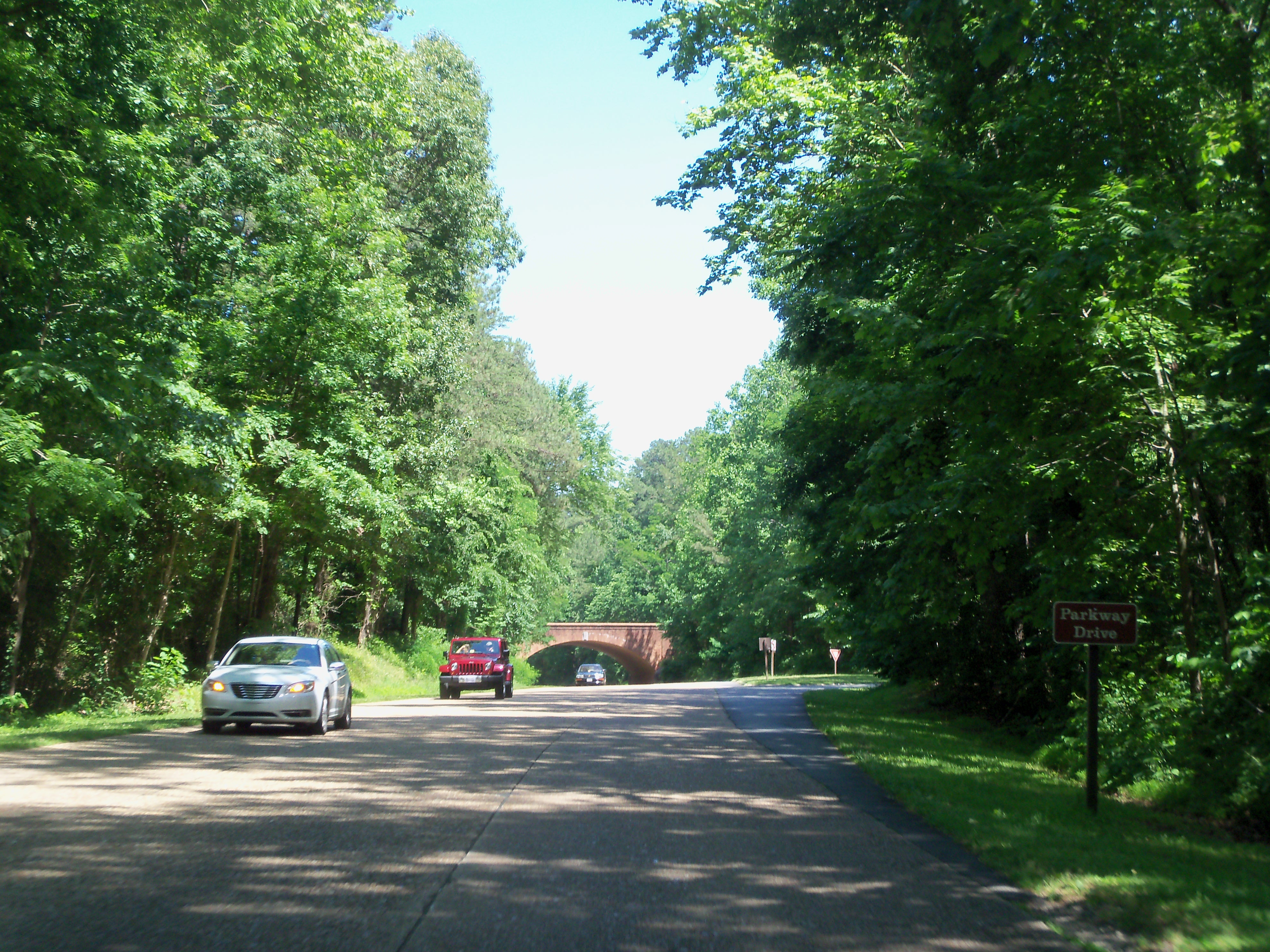 Williamsburg, VA, USA